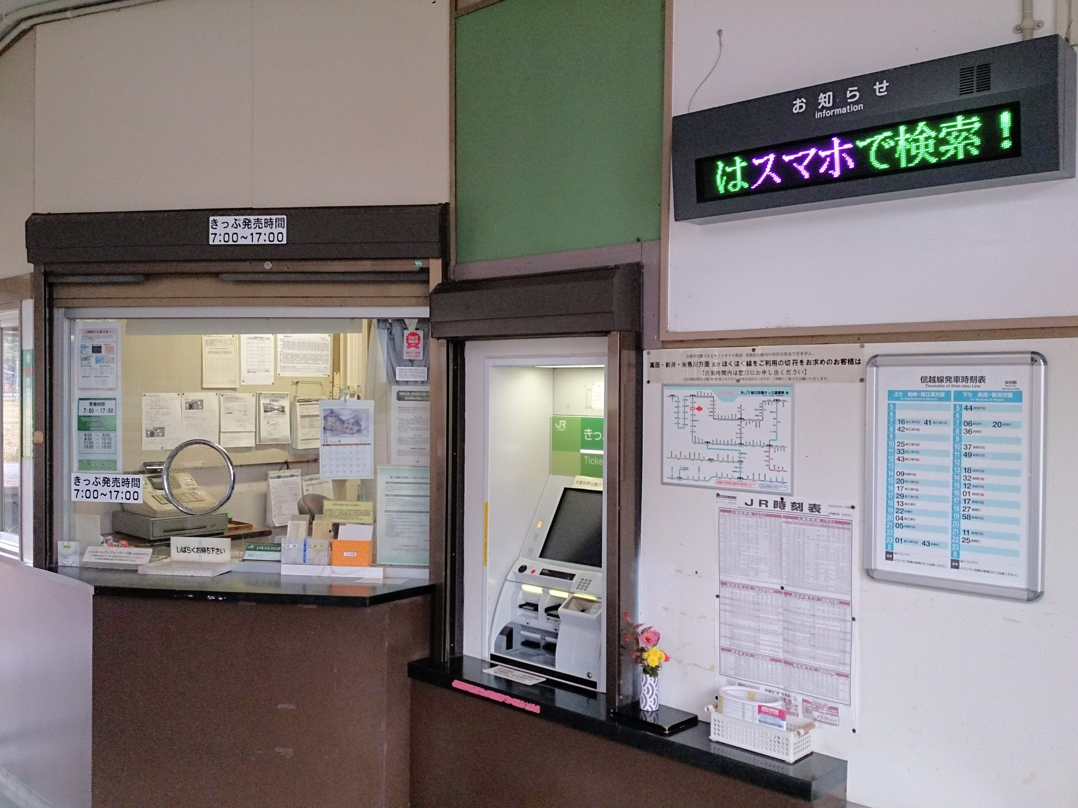 新潟・安田駅の窓口・タッチパネル式自動券売機・お知らせ標